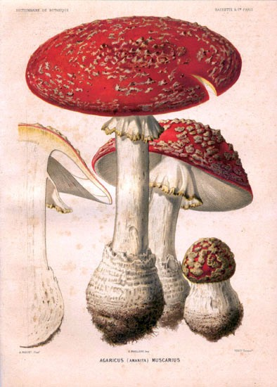 Amanita muscaria (L.:Fr.) Hook.